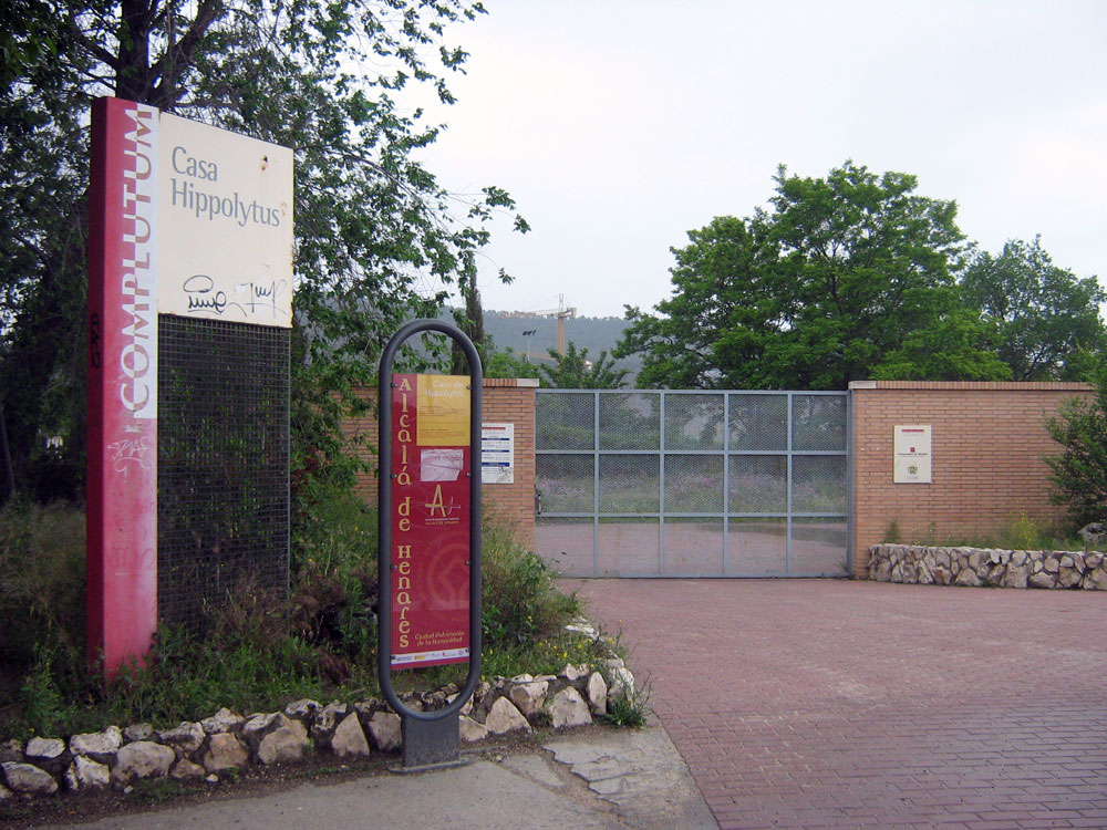 Acceso a la Casa de Hippolytus, un yacimiento arqueológico de época romana ubicado en Alcalá de Henares